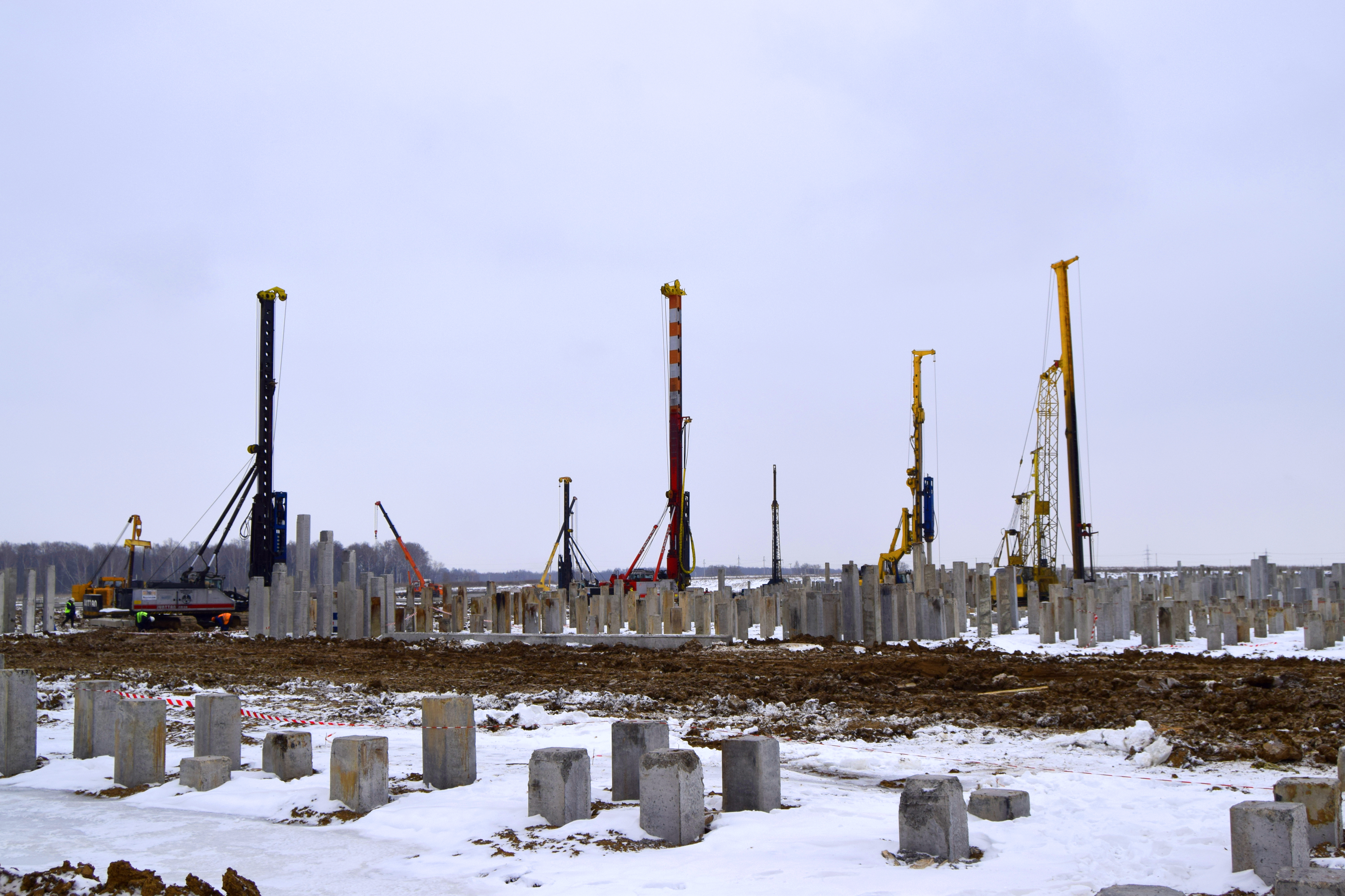 Строительство автозавода Great Wall в индустриальном парке «Узловая»